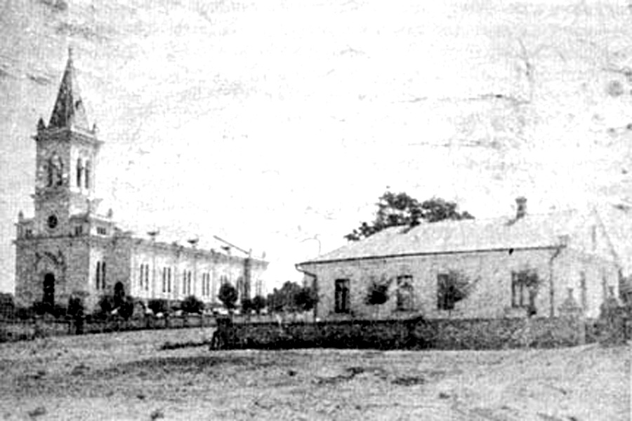 Собор Пресвятої Трійці у Канделі